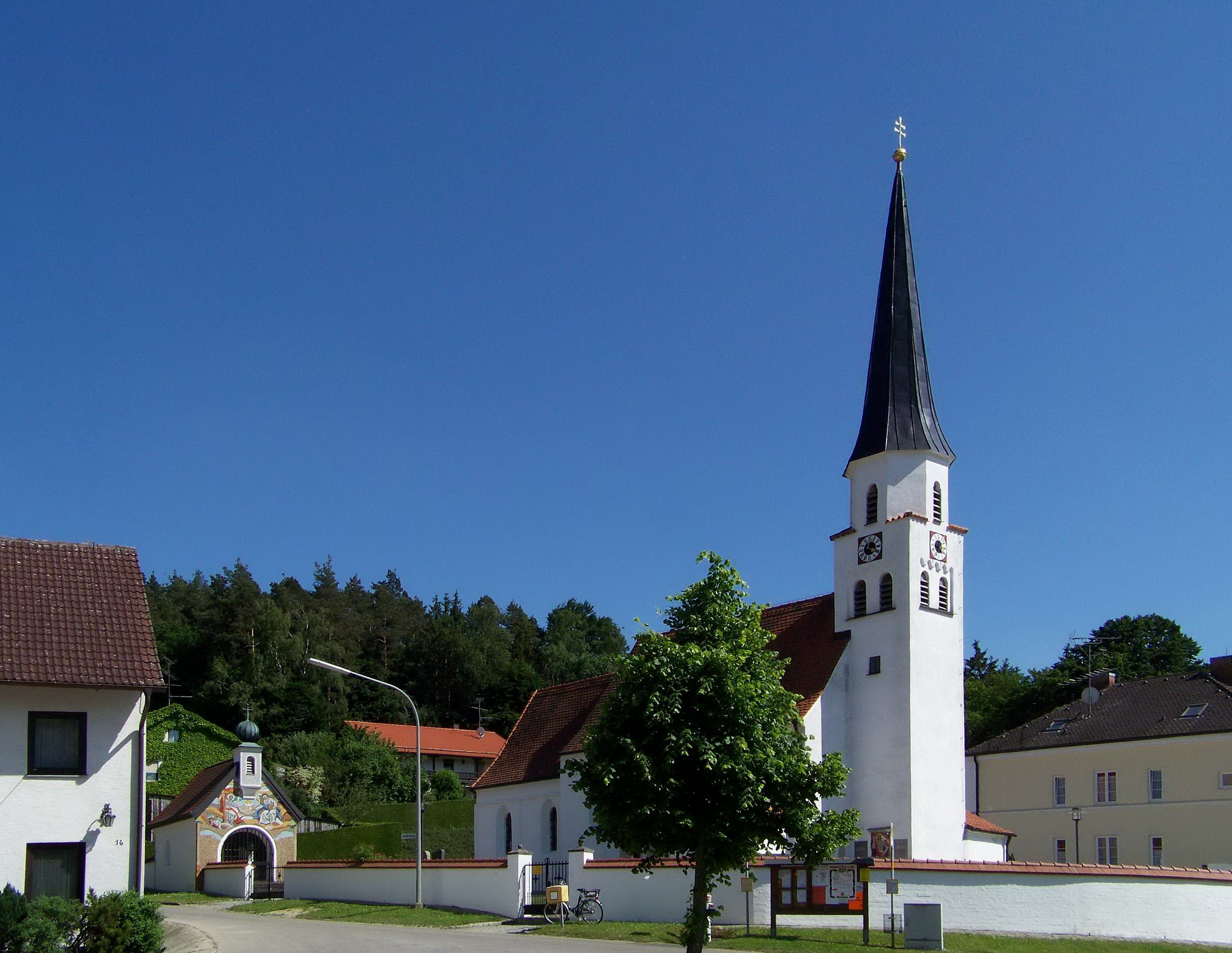 Bruckberg, Tondorf, Zeilerberg 2. Kirche St. Michael, Langhaus und Turm frühgotisch, um 1300, Chor spätgotisch, Mitte 15. Jahrhundert; mit Ausstattung.